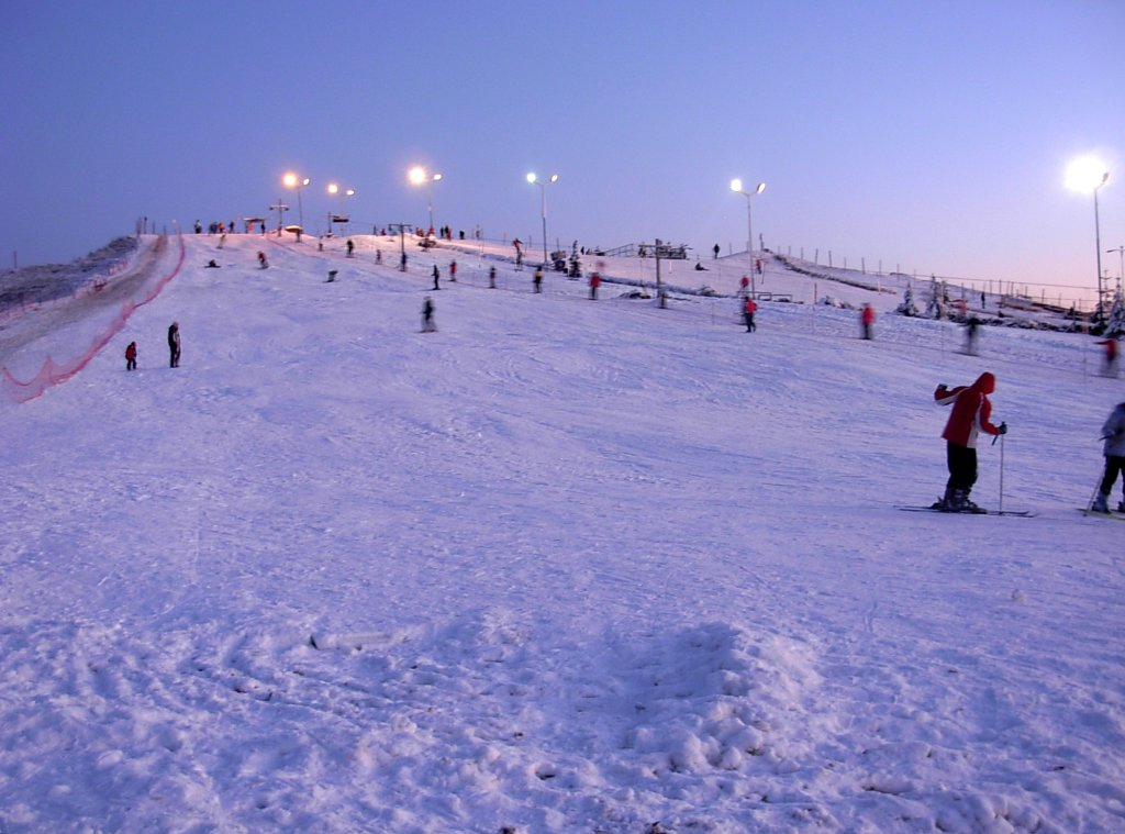 Stok narciarski w Myślęcinku